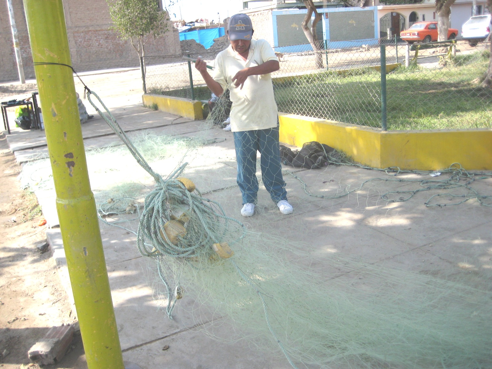 Pescador artesanal tejiendo una red en la plazuela de Comatrana, ciudad de Ica en el Perú.